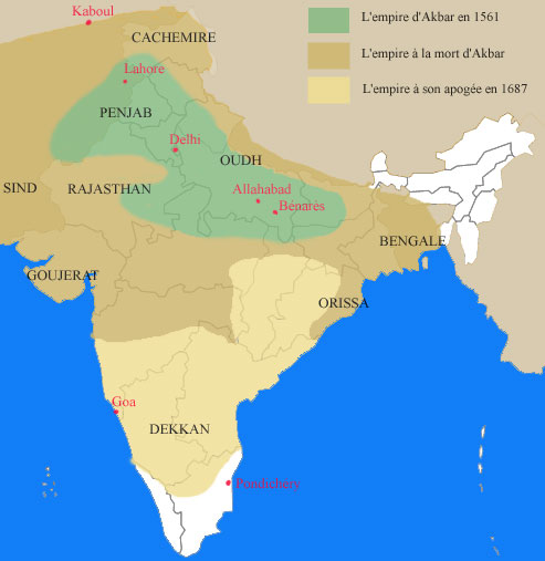 carte de l'expansion moghole en Inde